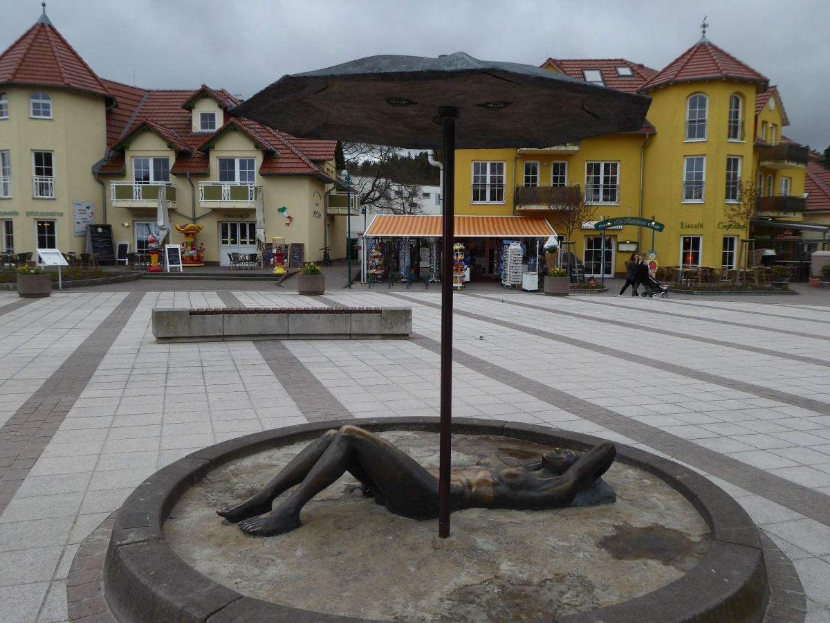 Plastik in Karlshagen